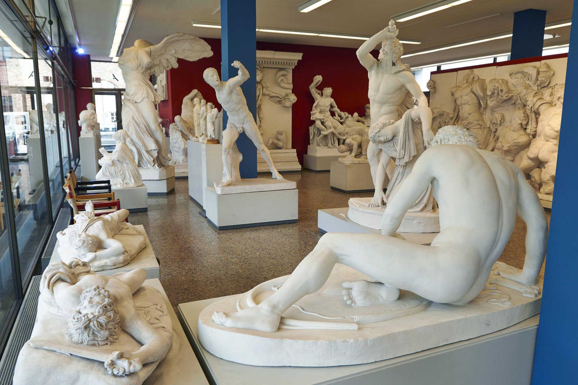 Antikenmuseum der Universität Heidelberg – Abguss-Sammlung, Ostsaal. Fotograf: Hubert Vögele